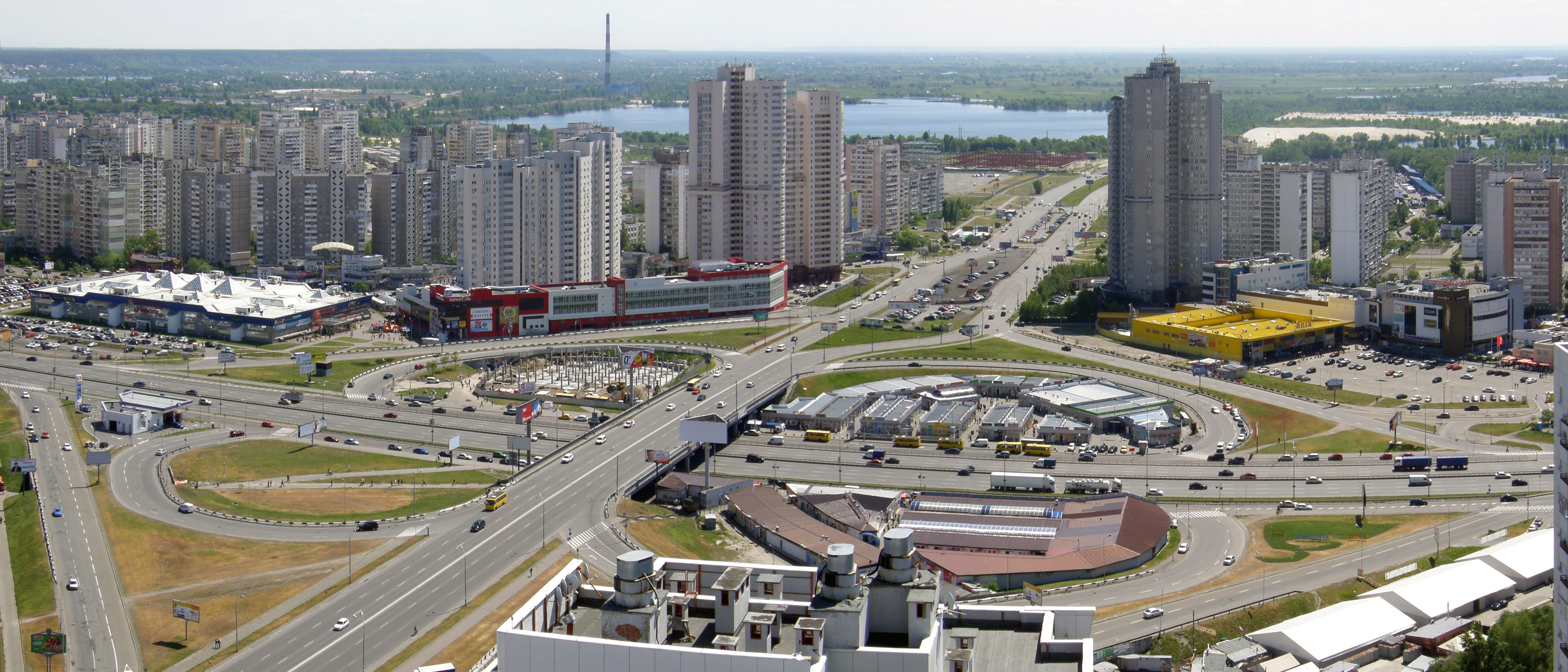 развязка проспектов Бажана и Григоренко